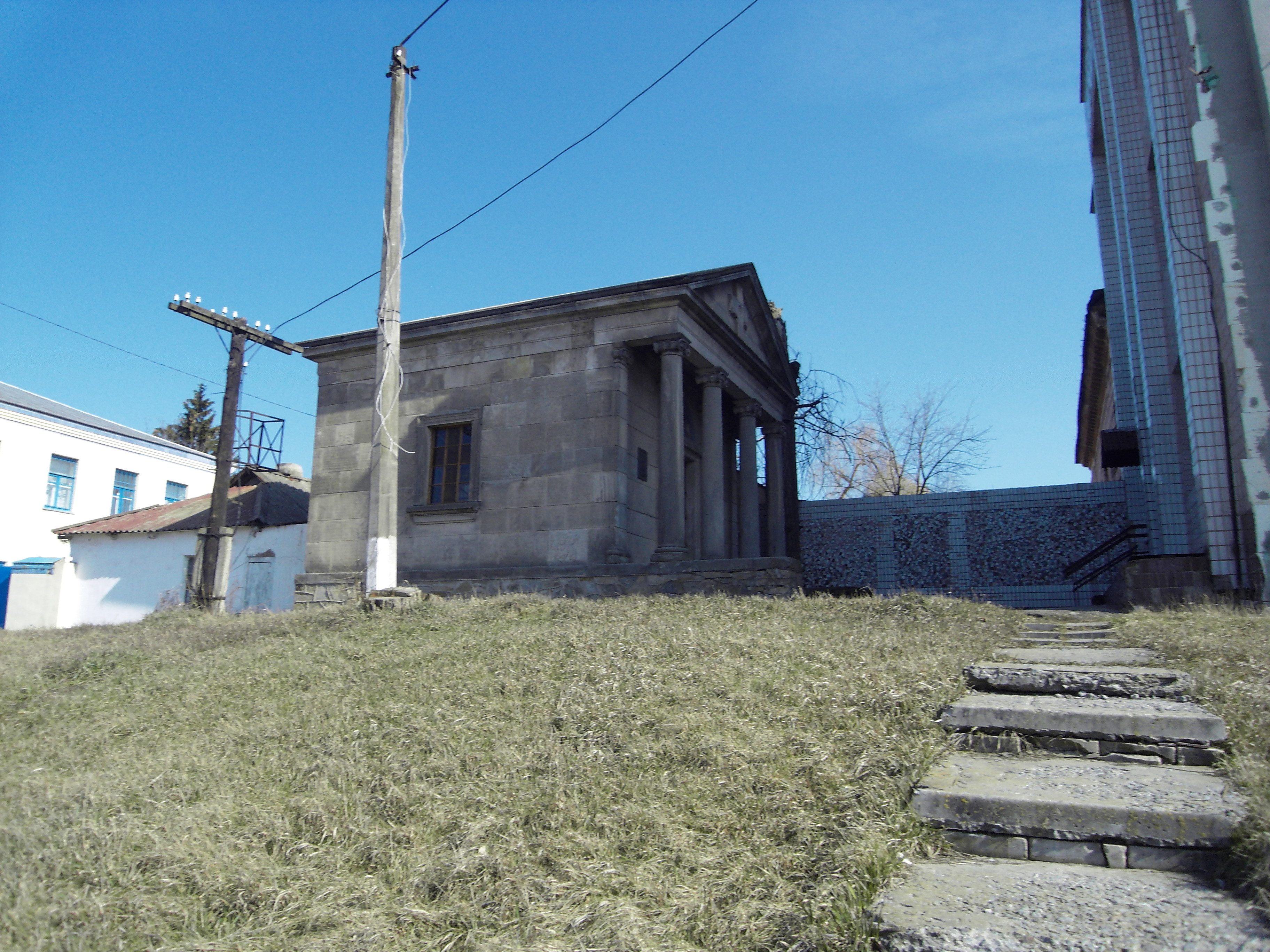 В 70х роках було знесено ратушу, побудовану в 1620−1630 х роках, що стояла на схід від укріпленого замку, побудованого князями Острозькими. 11 березня 2006 року католики Тетієва отримали ключі від каплиці, що була частиною мурованого католицького костьолу, що стояв на місці давнього дерев'яного костьолу, що за радянських часів був переобладнаний на клуб, потім на будинок піонерів, і врешті решт став заводським цехом заводу «Електронмаш», а сама каплиця, з якої були вивезені церковні цінності, спалені ікони, а зі склепів викинуті домовини служила складом для заводу.